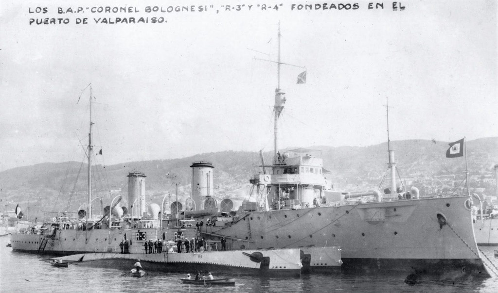 Fotografía de la época en donde se puede ver al Crucero peruano BAP Coronel Bolognesi y los submarinos peruanos R-3 y R-4 fondeados en Valparaíso en la visita oficial a Chile en 1930.